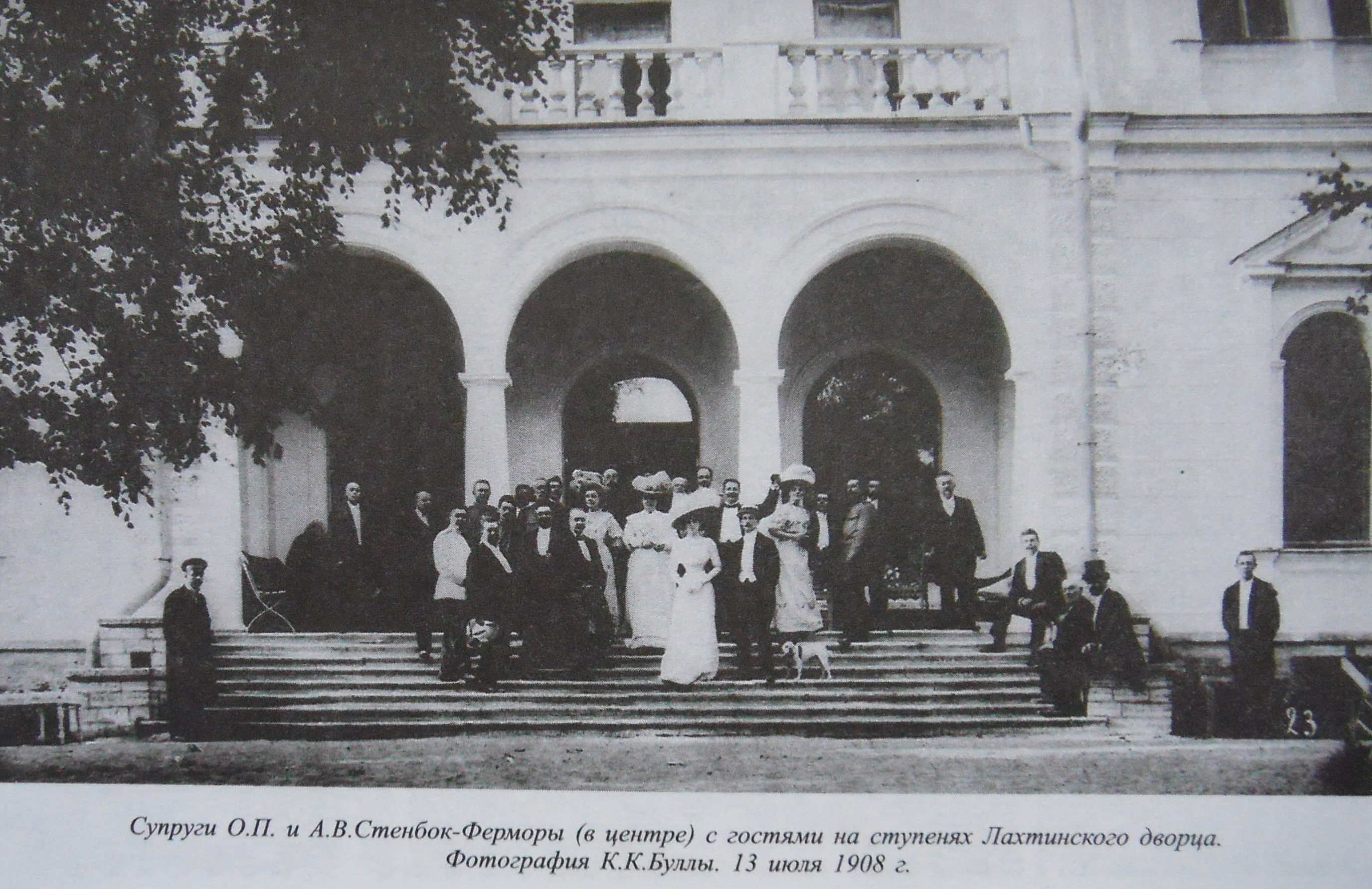 Лахта СПб перед замком Стенбок-Ферморов в Лахте в 1908 году